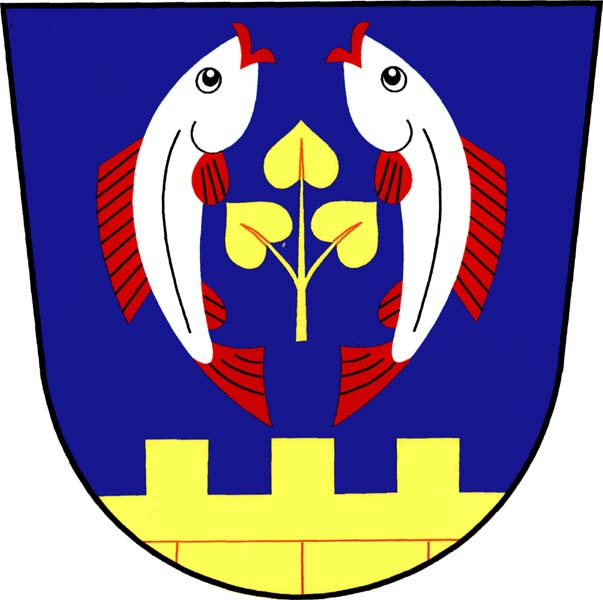 Znak obce Slavíkov (okres Havlíčkův Brod)